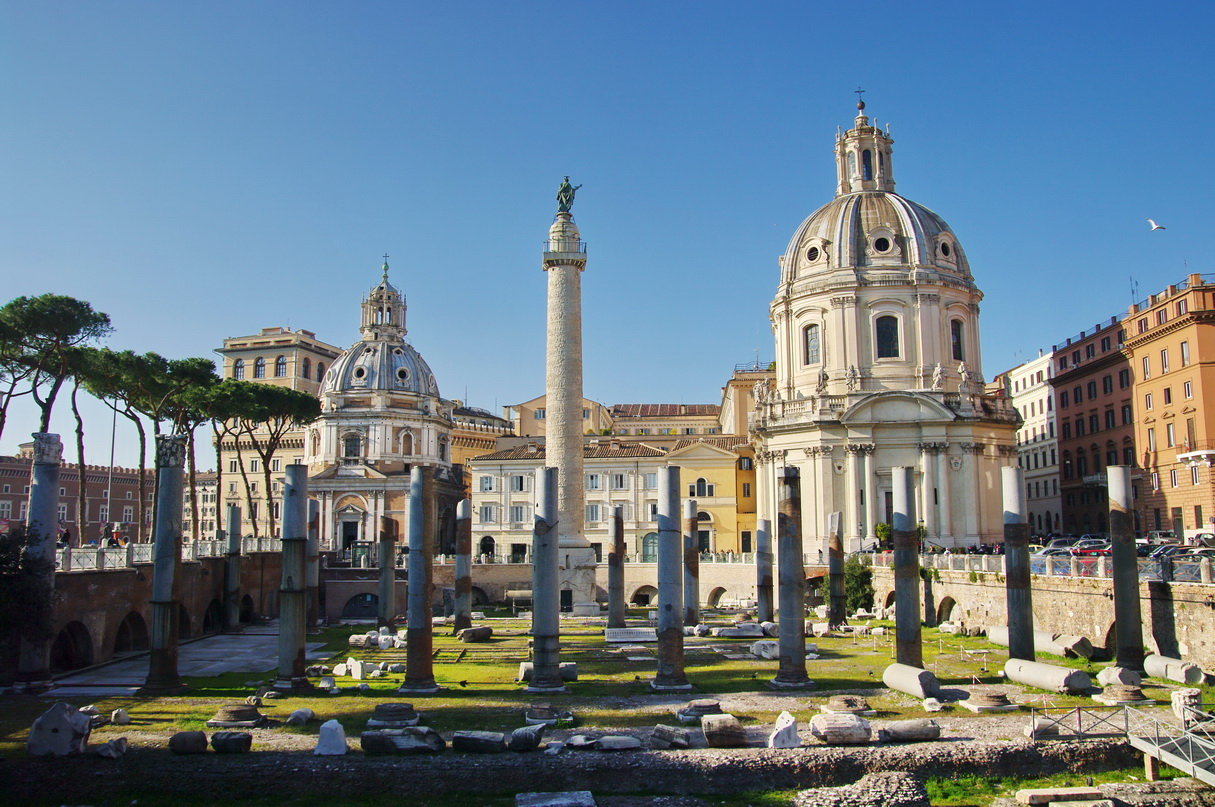 Kaiserforen, Via dei Fori Imperatori, Rom